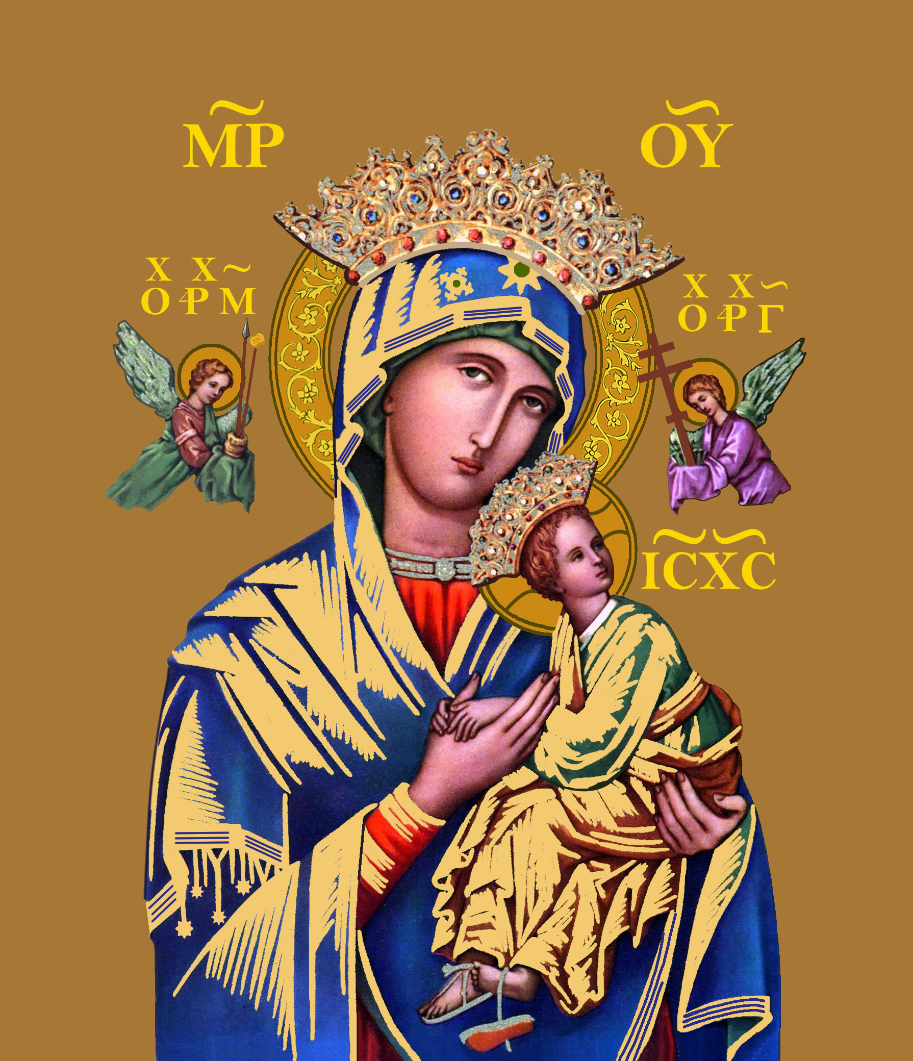 Icono Mariano de la Madre de Dios de la Pasión